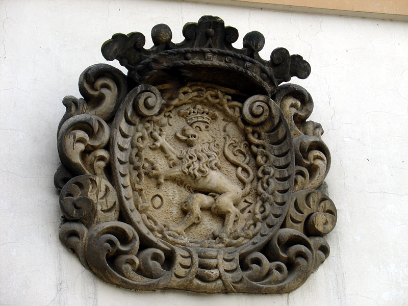 Městský znak umístěný na kostele sv. Mikuláše v Jaroměři.